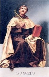 Портрет святого Ангела Кармелита, мученика. Автор неизвестен.